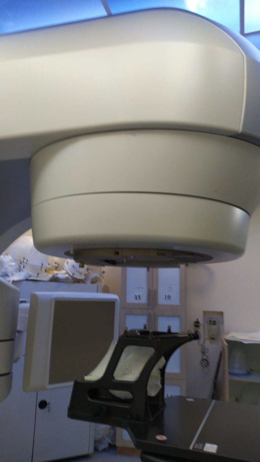 מאיץ קווי מוכן לטיפול ברדיוכירורגיה